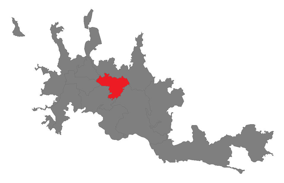 mapa de ubicacion de la comuna estacion en manizales